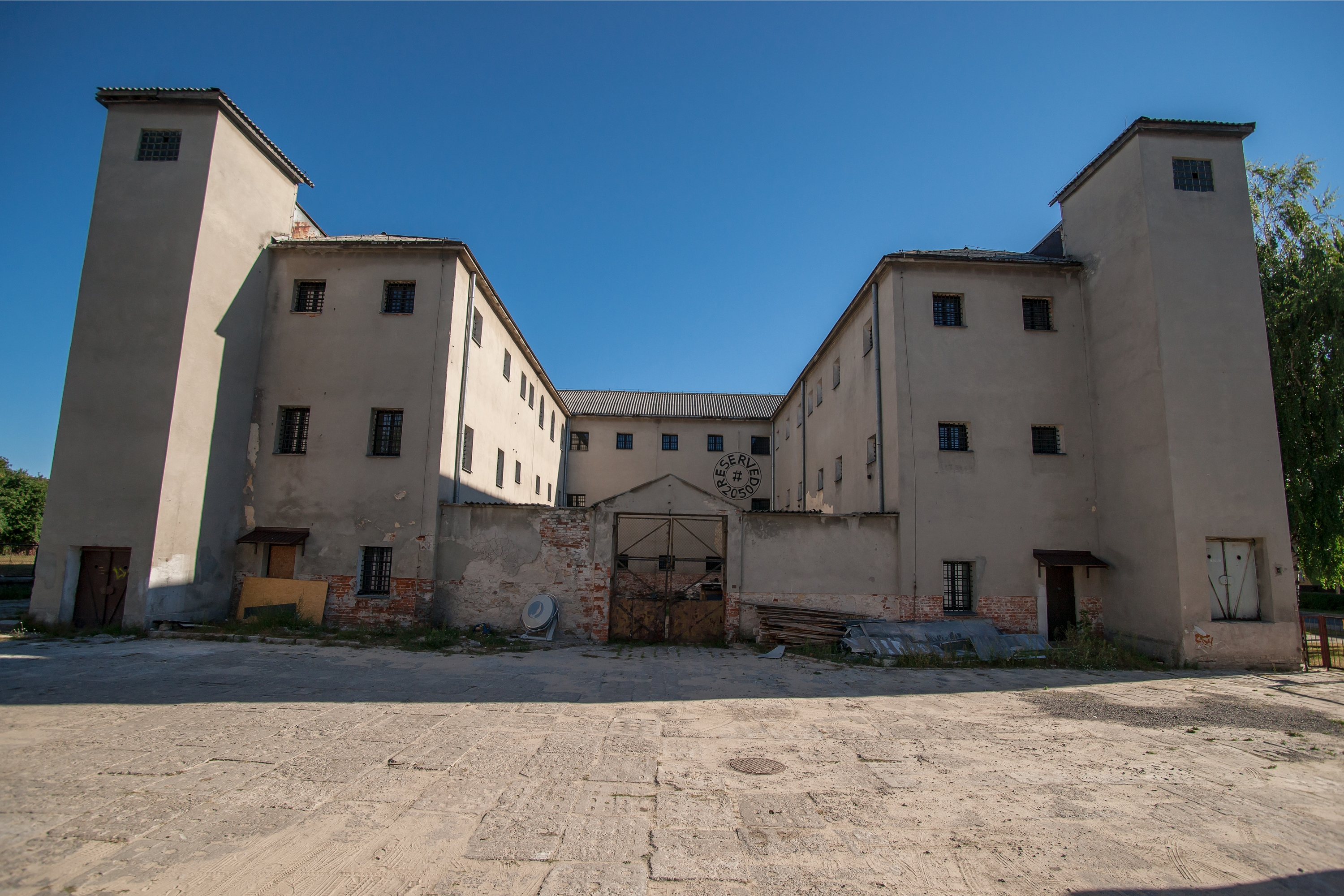 Janów Lubelski - dawne więzienie, obecnie "Muzeum Regionalne"